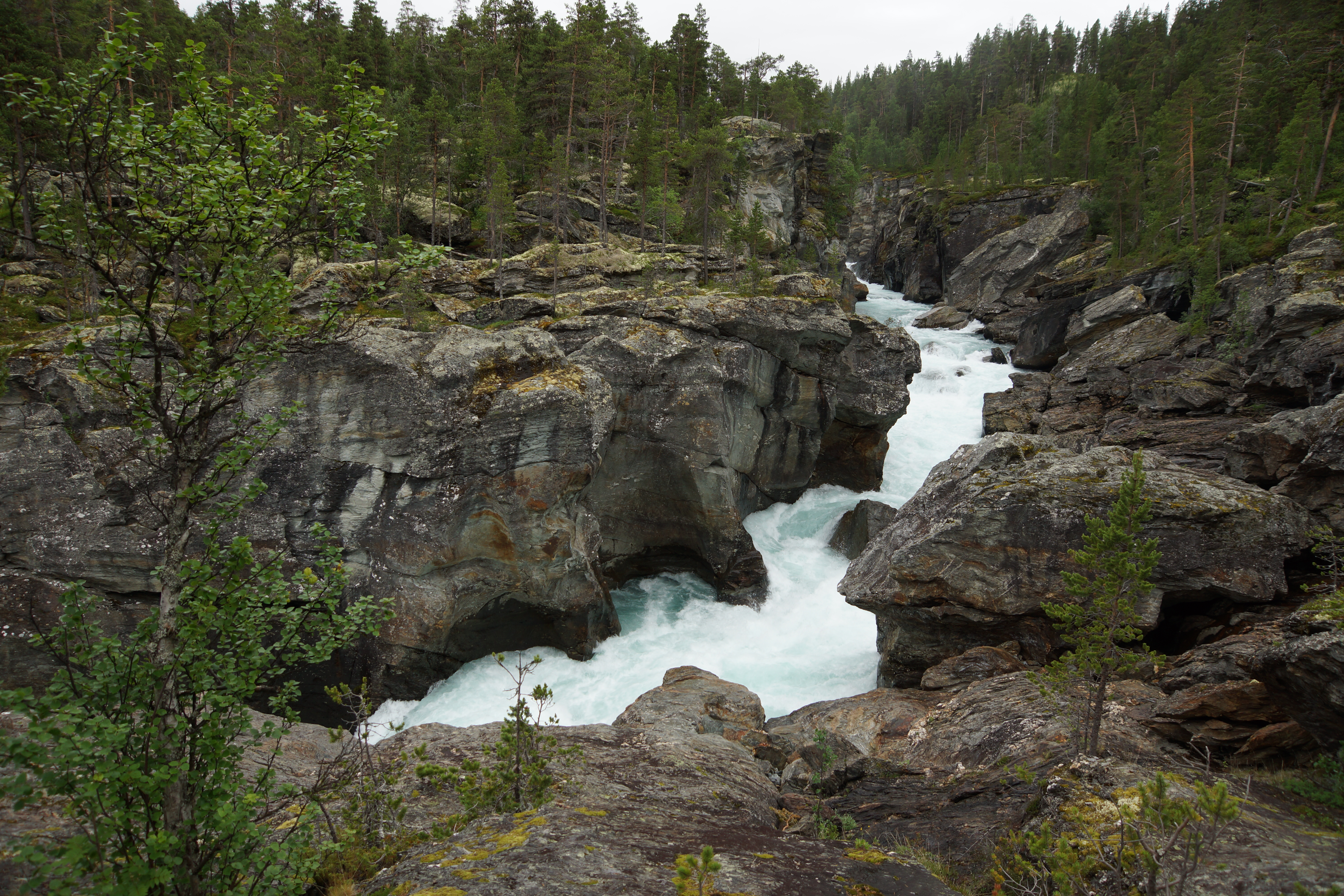 Ridderspranget er ei kløft lagd av elva Sjoa. Man kan se den ved å kjøre av fra riksvei 51 nord for Valdresflya. Avkjørselen er skiltet.